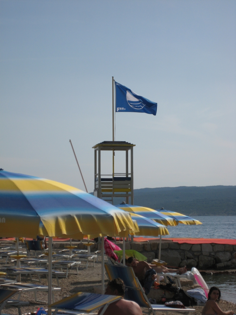 Plava zastava, Croatia